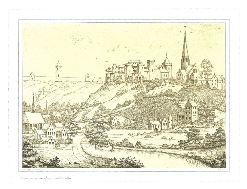 Deze prent bevindt zich op pagina 117 in: E. Van Even, Louvain Monumental, Leuven 1860. Op de prent ziet men het oude kasteel van de Brabantse hertogen. Rechts ziet men de Sint-Janskerk, links de "Boelenberg" en op de achtergrond de "Verloren Kost", de buitenwallen en de Mechelsepoort. Op de voorgrond ziet men op de rivier een persoon in een klein bootje. De burcht op de Keizersberg is de derde burcht van de hertogen gaande tot de 16e eeuw toen Karel V er zijn intrek genomen had. In 1375, 1505 en onder Karel V werd de burcht gerestaureerd. Nadien deedt er zich verval voor en de omheiningsmuur werd in de 17e eeuw gesloopt. De gehele afbraak vond plaats tijdens Jozef II (1783). Van de eenmalige belangrijke burcht (ophaalbrug, binnenplaatsen, woonvertrekken, slottoren enz.) zijn slechts schaarse overblijfselen behouden gebleven: gedeelten van de omheiningsmuur en overwelfde kelders uit de 14e eeuw, de poort met tongewelf uit dezelfde periode en recent opgegraven fundamenten van de Sint-Jan-de-Doperkapel onder de neo-Romaanse Benedictijnenabdijkerk van 1806. Context: grafiek tekst links bovenaan Tekst:Louvain Monumental. links onderaan Tekst:Vander Baren. Pinx. 1595. rechts onderaan Tekst:A. Joos. Sc. tekst centraal onderaan prent Tekst:1. Le chateau de Louvain.- 2. L'Église de St. Jean et la commanderie de chantrain.- 3. La tour appelée "Dépense Perdue". 4. Le pressoir des vignobles du duc de Brabant.- 5. Le petit béguinage.- /6. Le baetsfoort.- 7. Le temple de Diane. tekst handgeschreven links onderaan Tekst:Liste Petit N°I8.